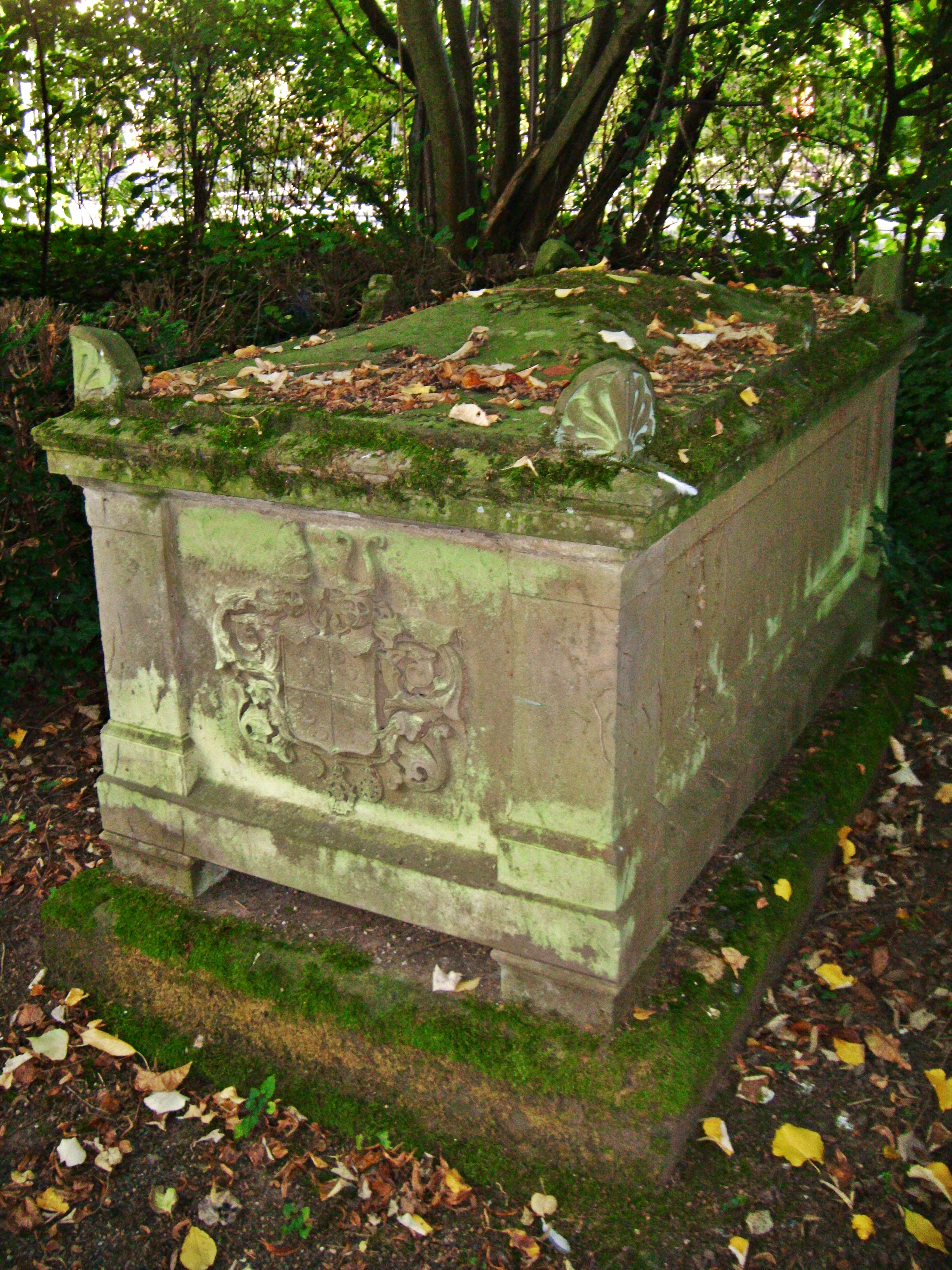 Joseph von Gumppenberg (1798-1855) bayerischer Generalmajor und Kommandant der Festung Landau (Pfalz), Grabmal, Friedhof Landau